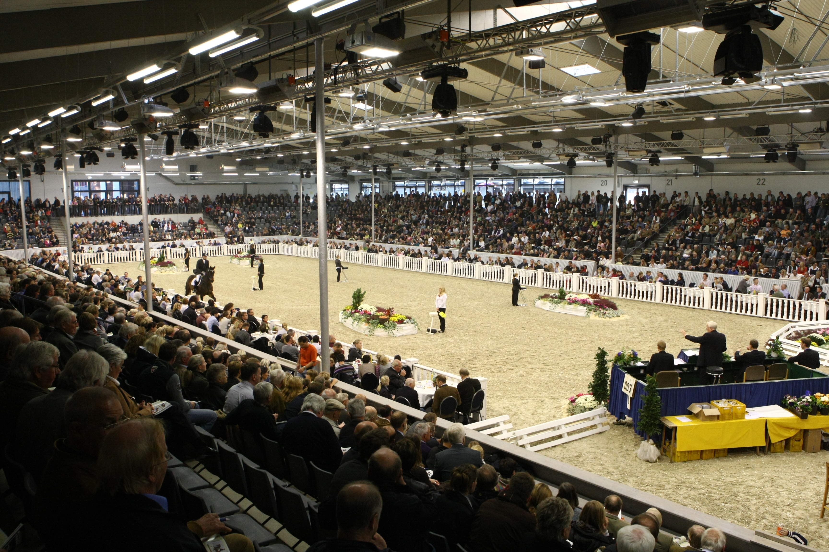 Die Niedersachsenhalle in Verden/Aller